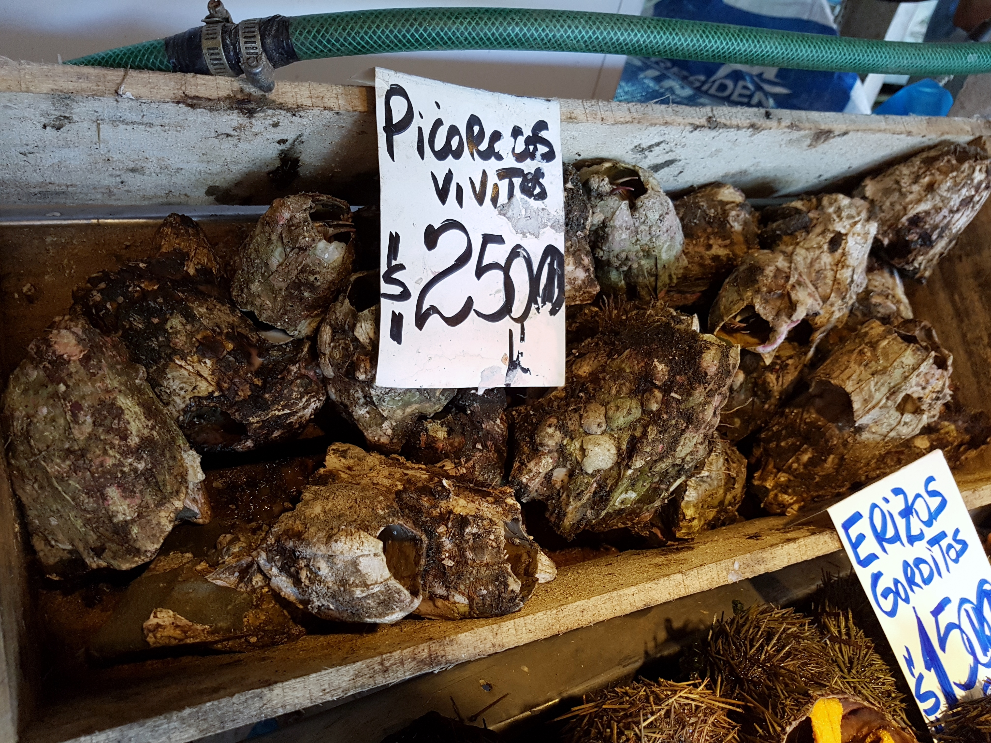 Picorocos (Austromegabalanus psittacus) a la venta en el Mercado Central de Santiago de Chile.